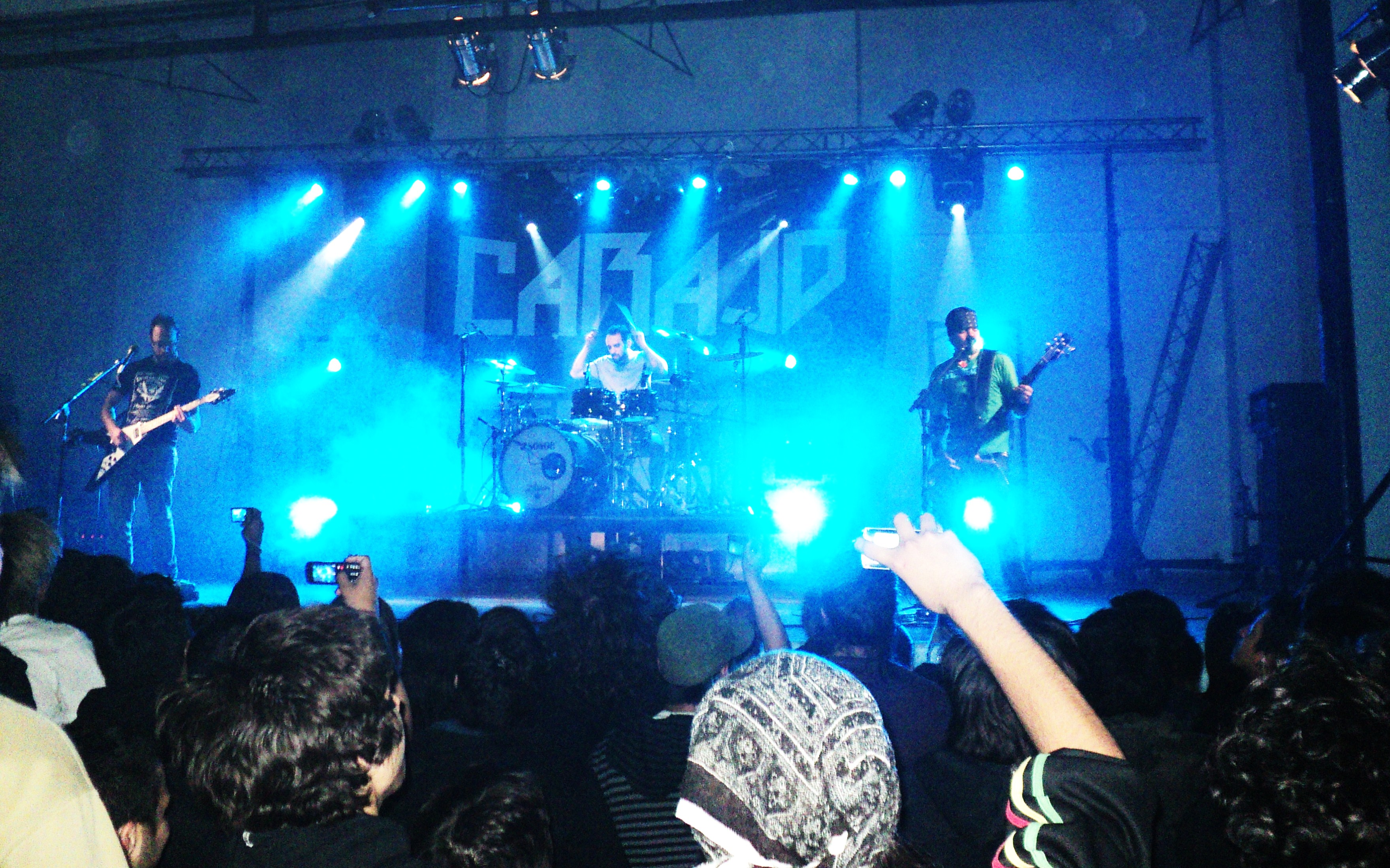 la banda tocando en vivo desde comodro rivadavia en su ultoimo disco